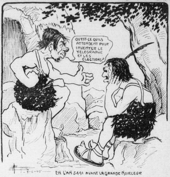 Caricature d'Albéric Bourgeois, dans le journal La Presse du 9 juin 1945 (p. 37), où l'expression « grande noirceur » apparait (probablement en réaction au gouvernement Duplessis, élu depuis moins d'un an).